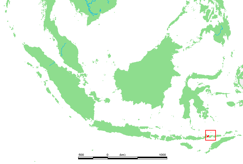 Andonar